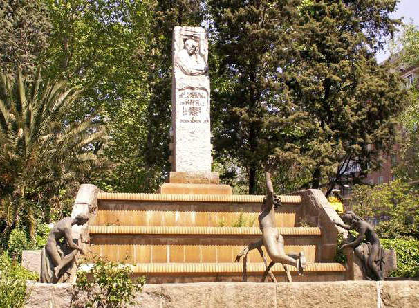 Monumento al Dr. Jiménez Díaz. Plaza de Cristo Rey, Madrid, entre la Clínica de la Concepción (Fundación Jiménez Díaz) y el Hospital Clínico de San Carlos.